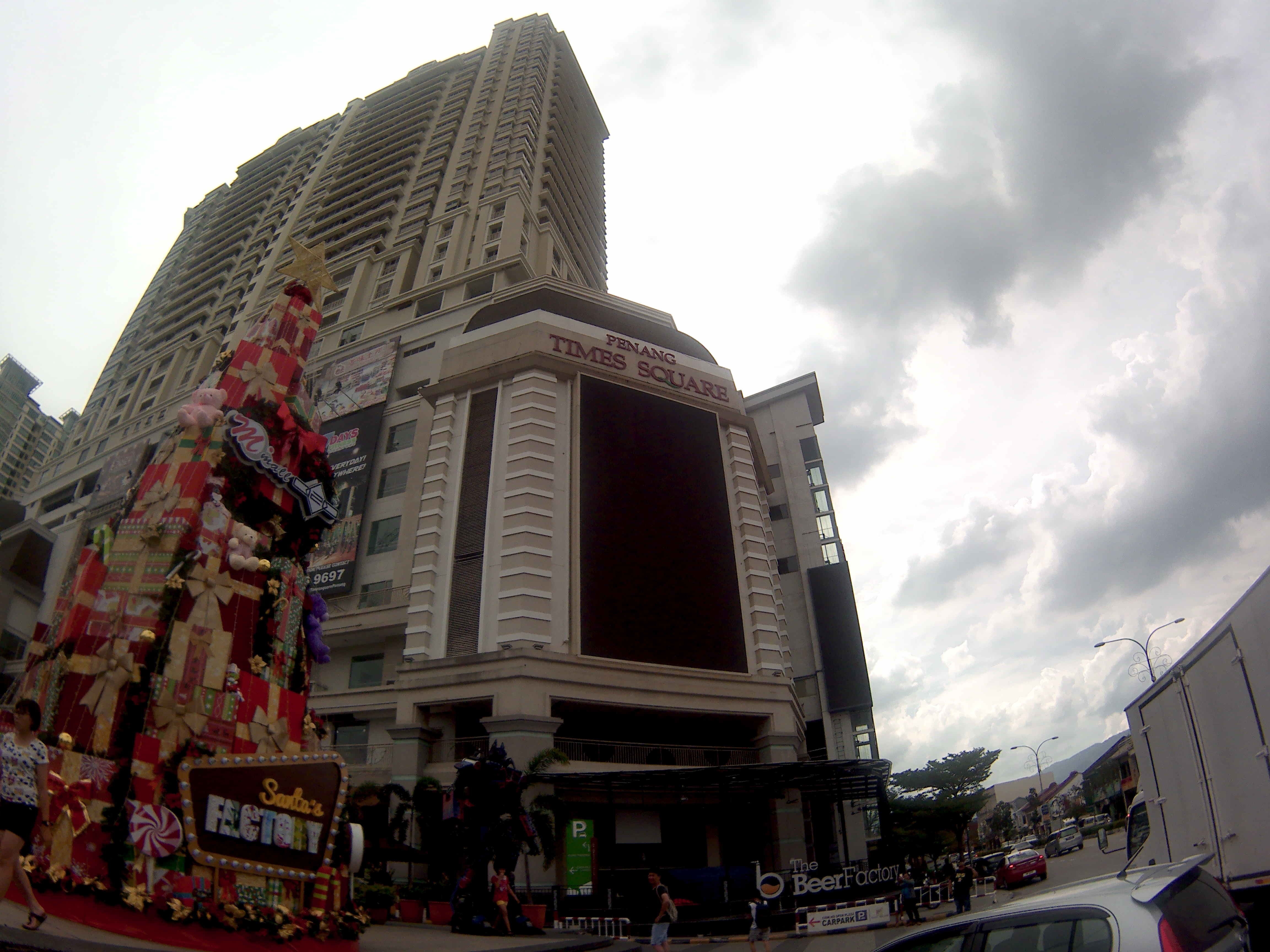 槟城时代广场